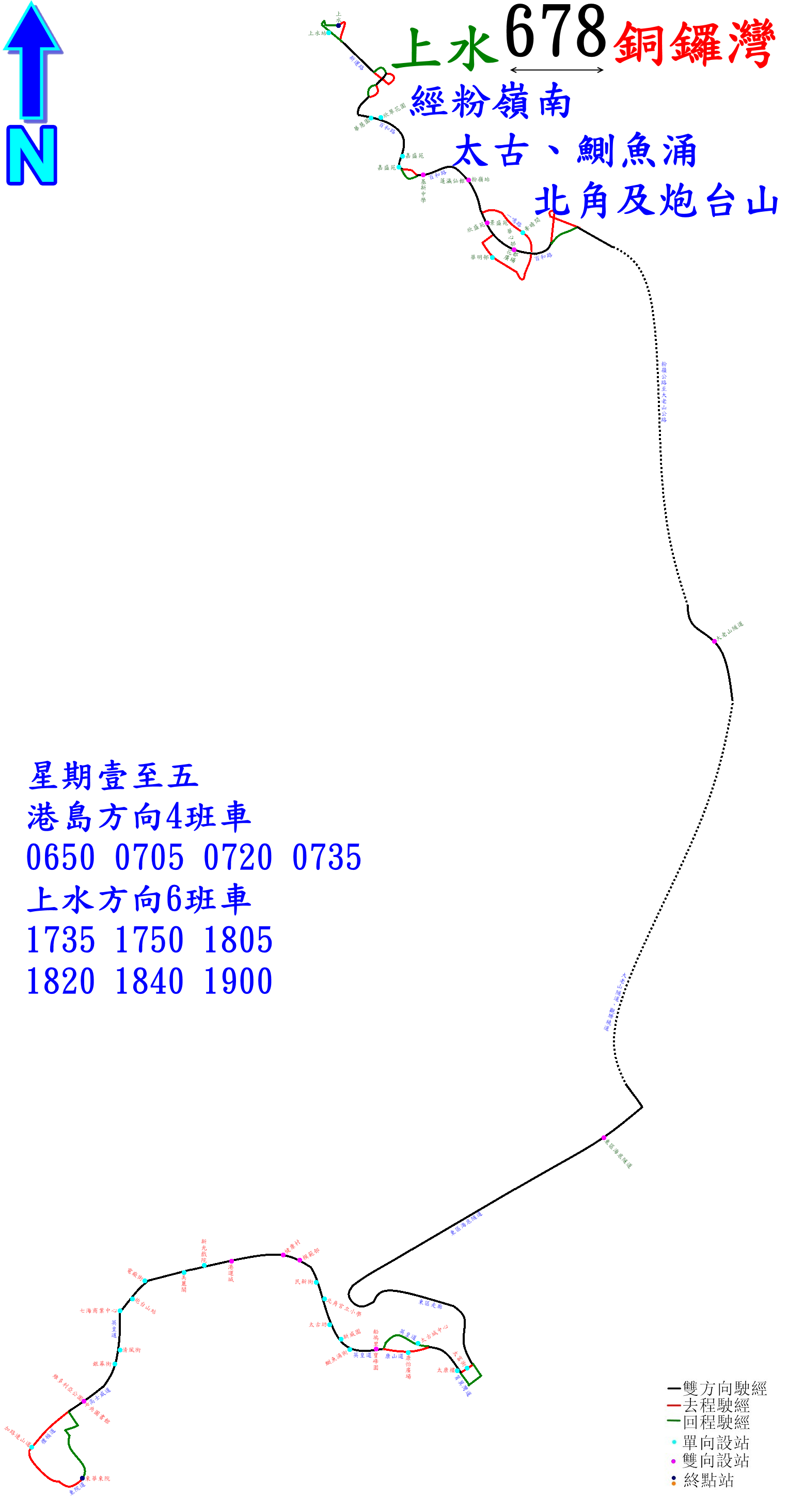 中文（香港）: 過海隧巴678線的走線圖